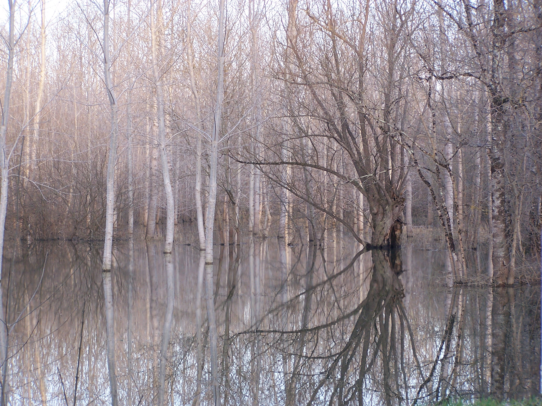 Photographie d'arbres ayant les pieds dans l'eau suite à une crue de la Charente.